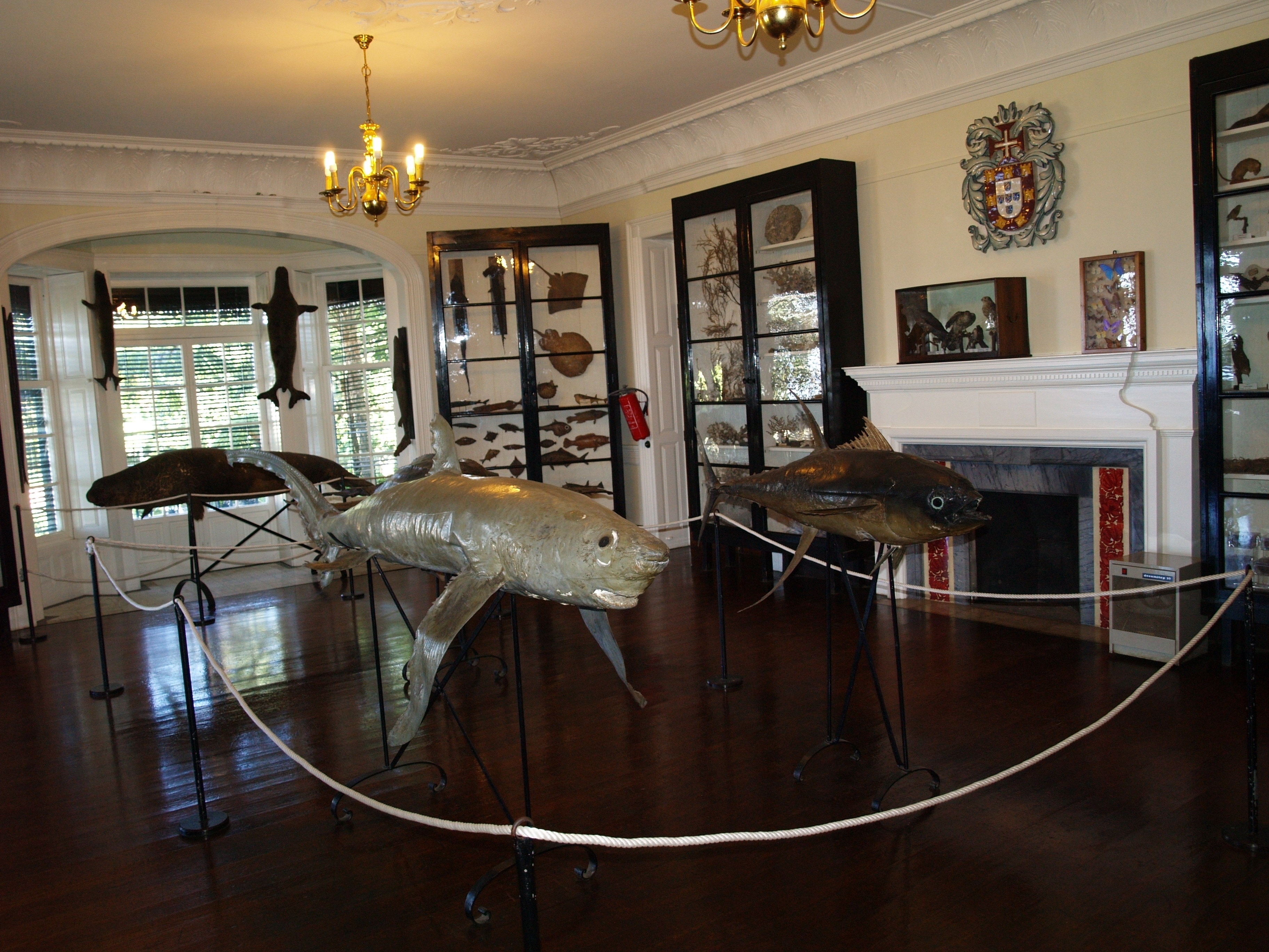 Museum of natural history in Jardim botanico da Madeira, Funachl, Madeira